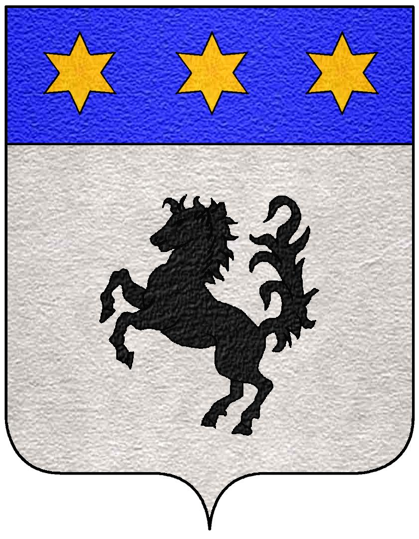 Stemma della famiglia Baracca